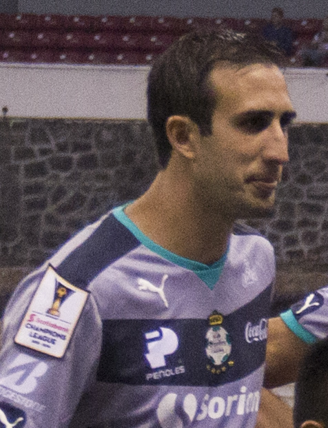 América vs Santos